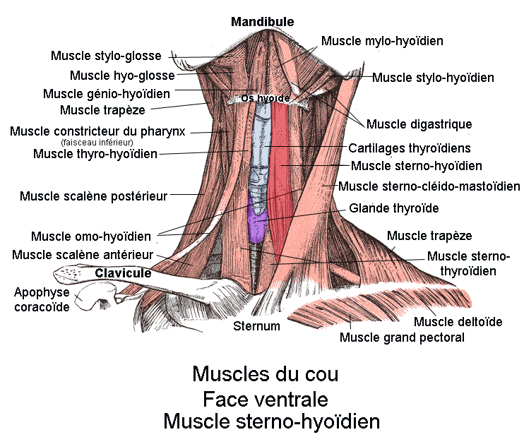 Muscle sterno hyoïdien. Vue antérieure du cou. Anatomie humaine.